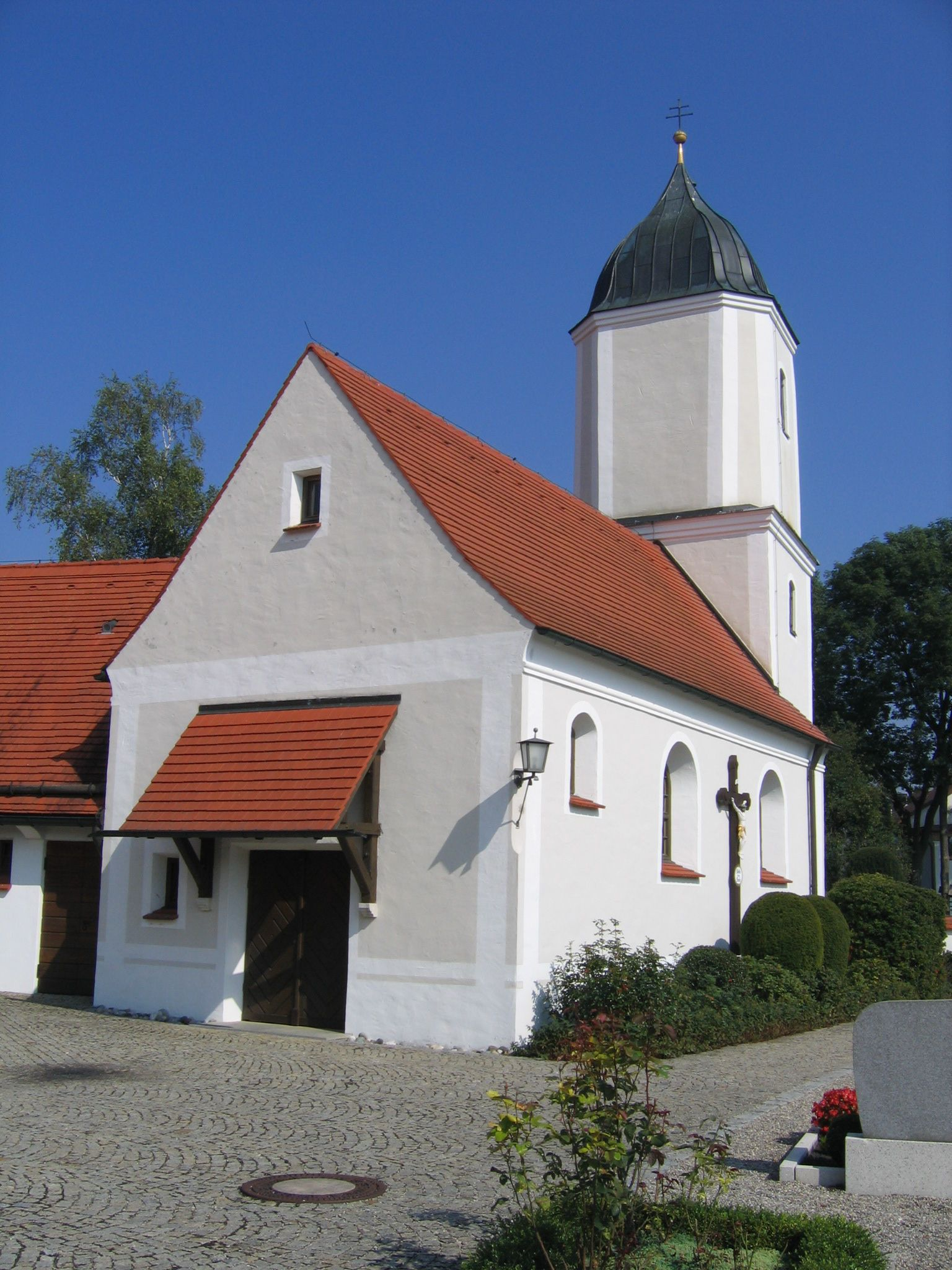 Die alte Kirche von Sehensand bei Neuburg-Donau.